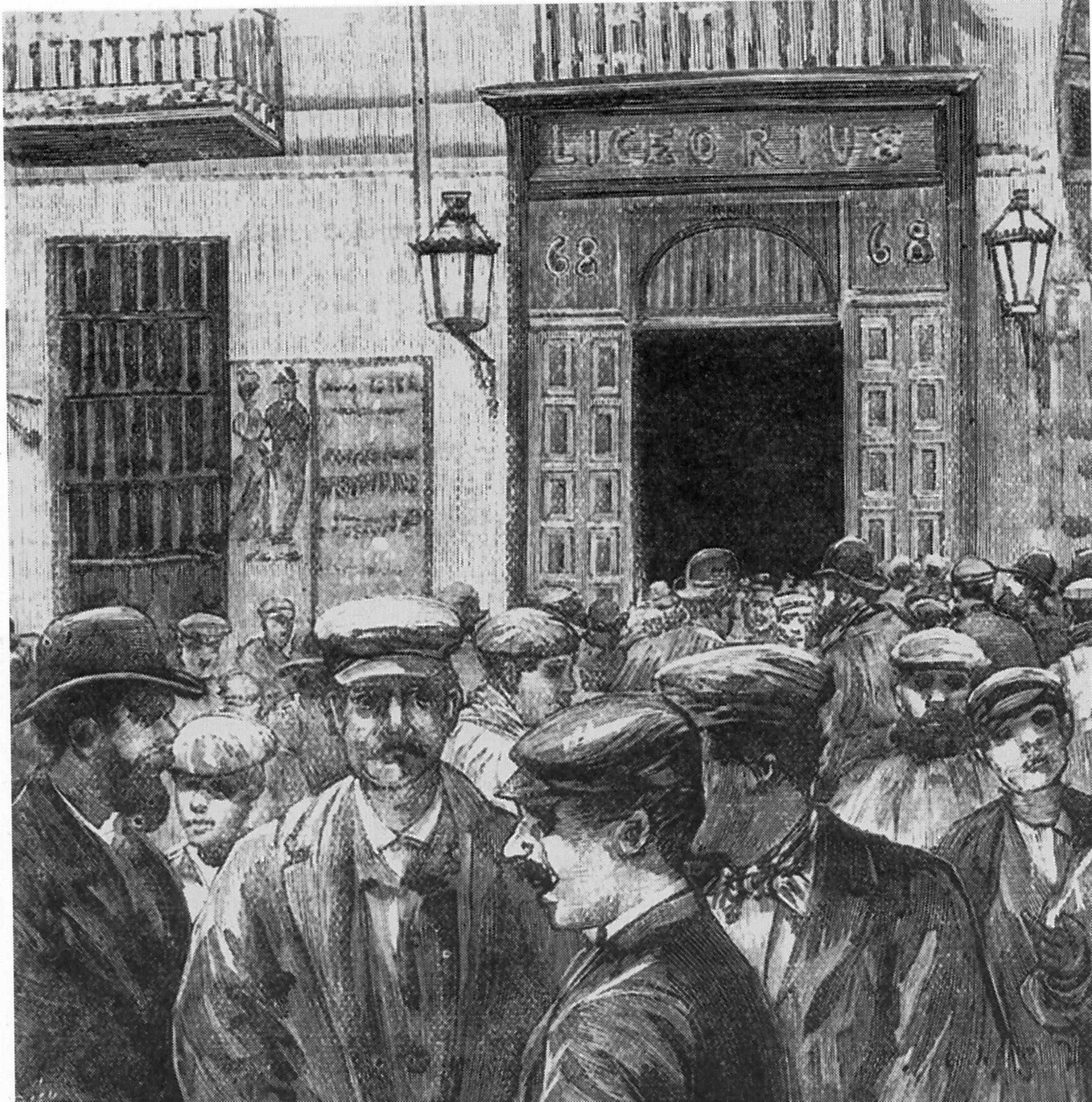 Grabado-ilustración de Comba de un grupo de trabajadores a la salida de un mitin en el Liceo Rius de la calle Atocha (Madrid)